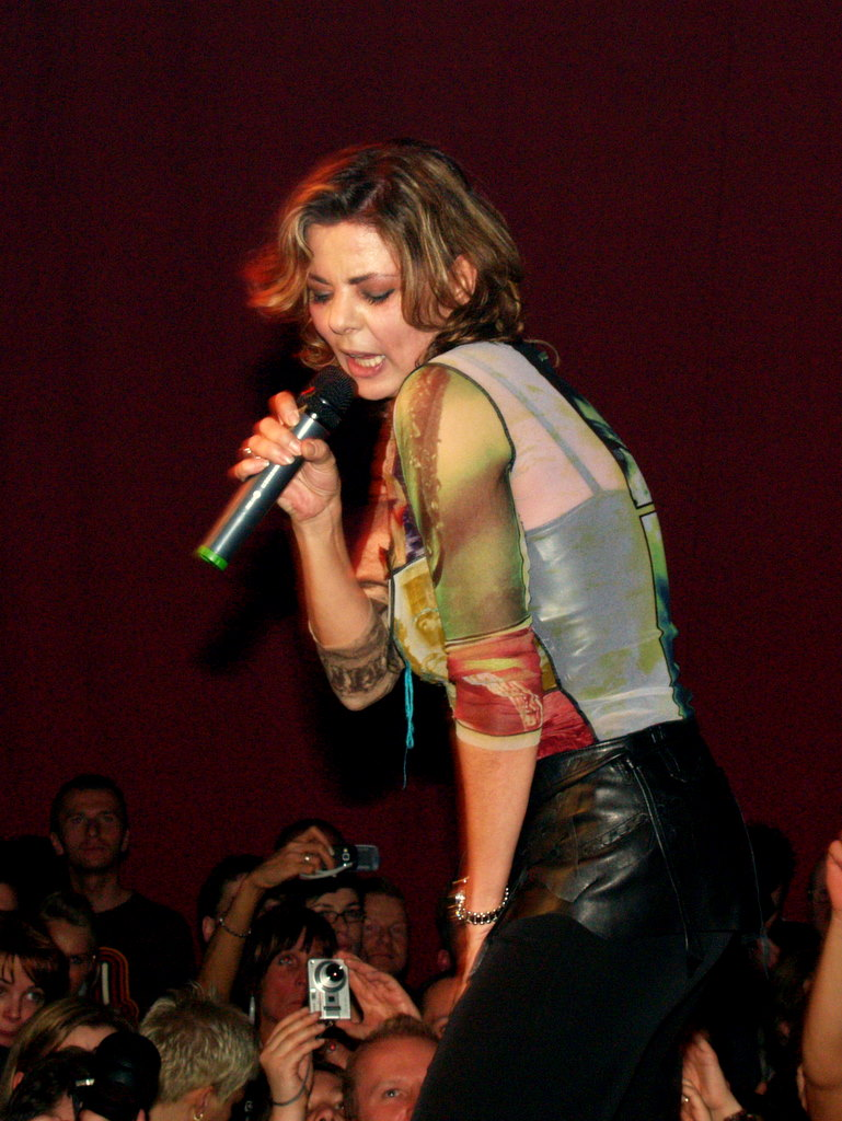 German singer Sandra Cretu.